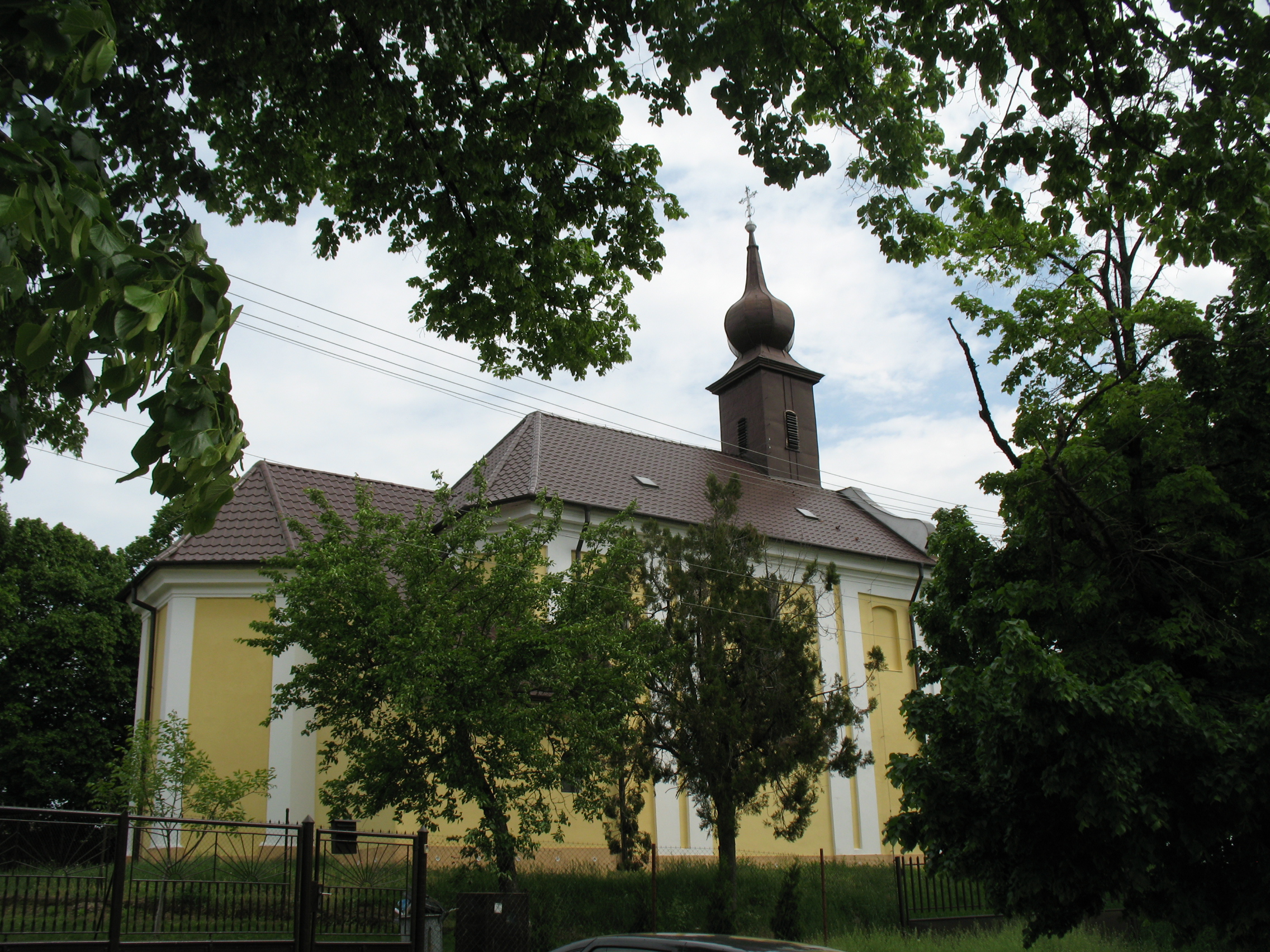 Mocsonok